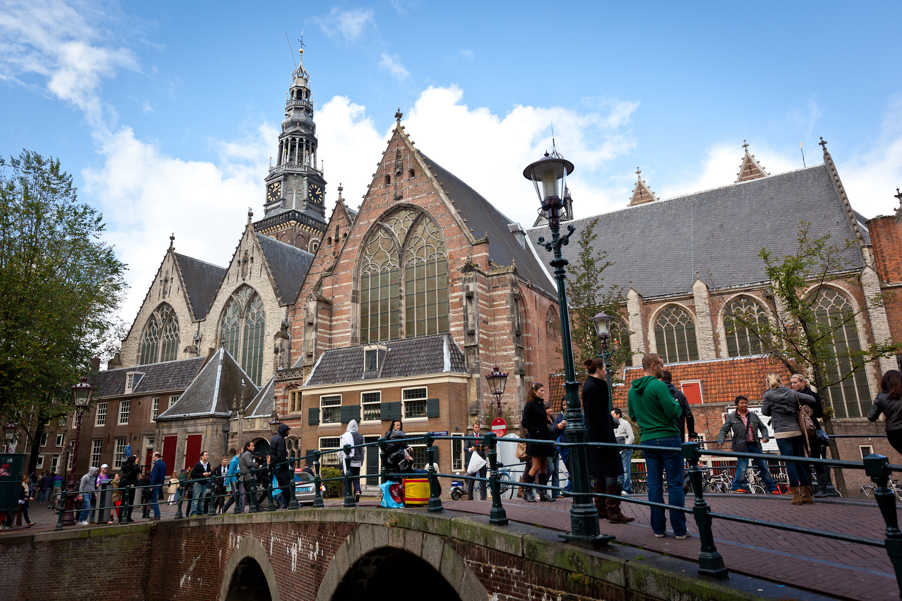 Amsterdam